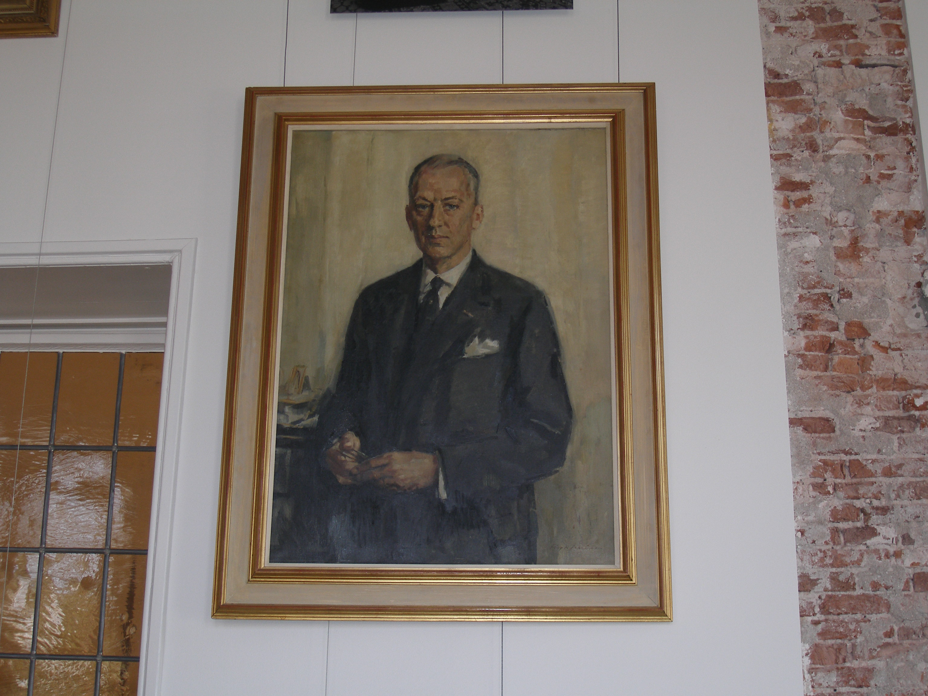 de Ranitz op een schilderij in het stadhuis van Utrecht. Coen de Ranitz burgermeester 1948 - 1970. Schilder Sierk Schröder.